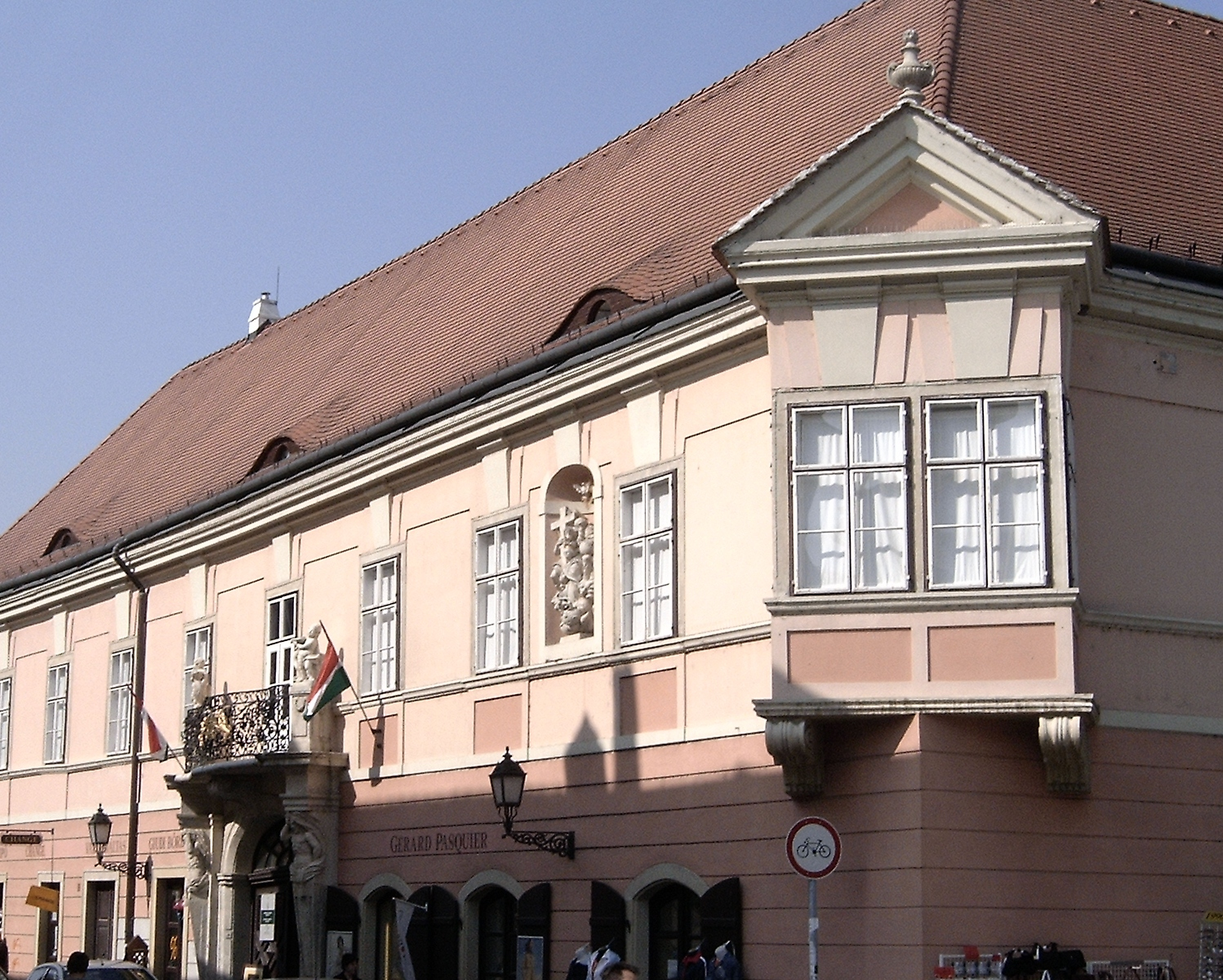 A győri Esterházy-palota (Győr-Moson-Sopron megye)